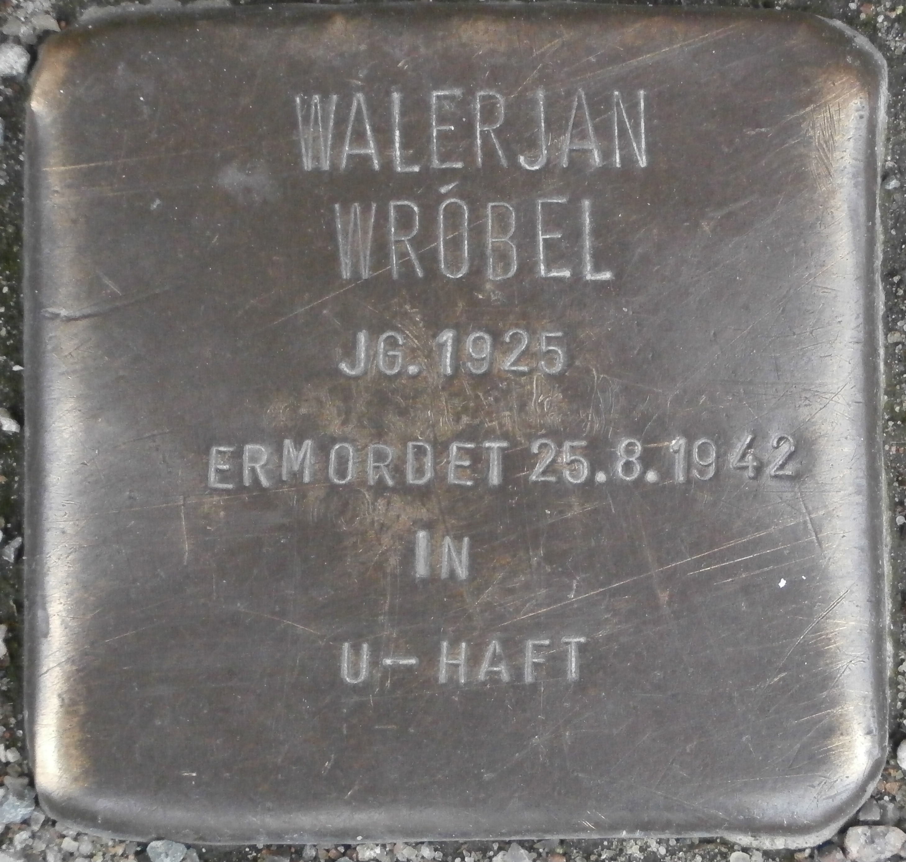 Stolperstein für Walerjan Wrobel vor der Untersuchungshaftanstalt Holstenglacis in Holstenglacis 3, Hamburg.